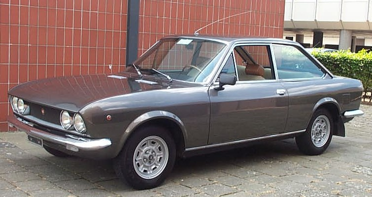 Fiat 124 Sport Coupé 2ª serie (1969-1972)